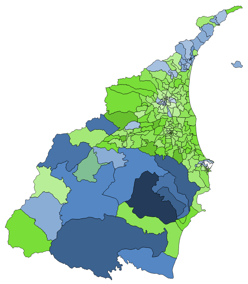 顏色對照表